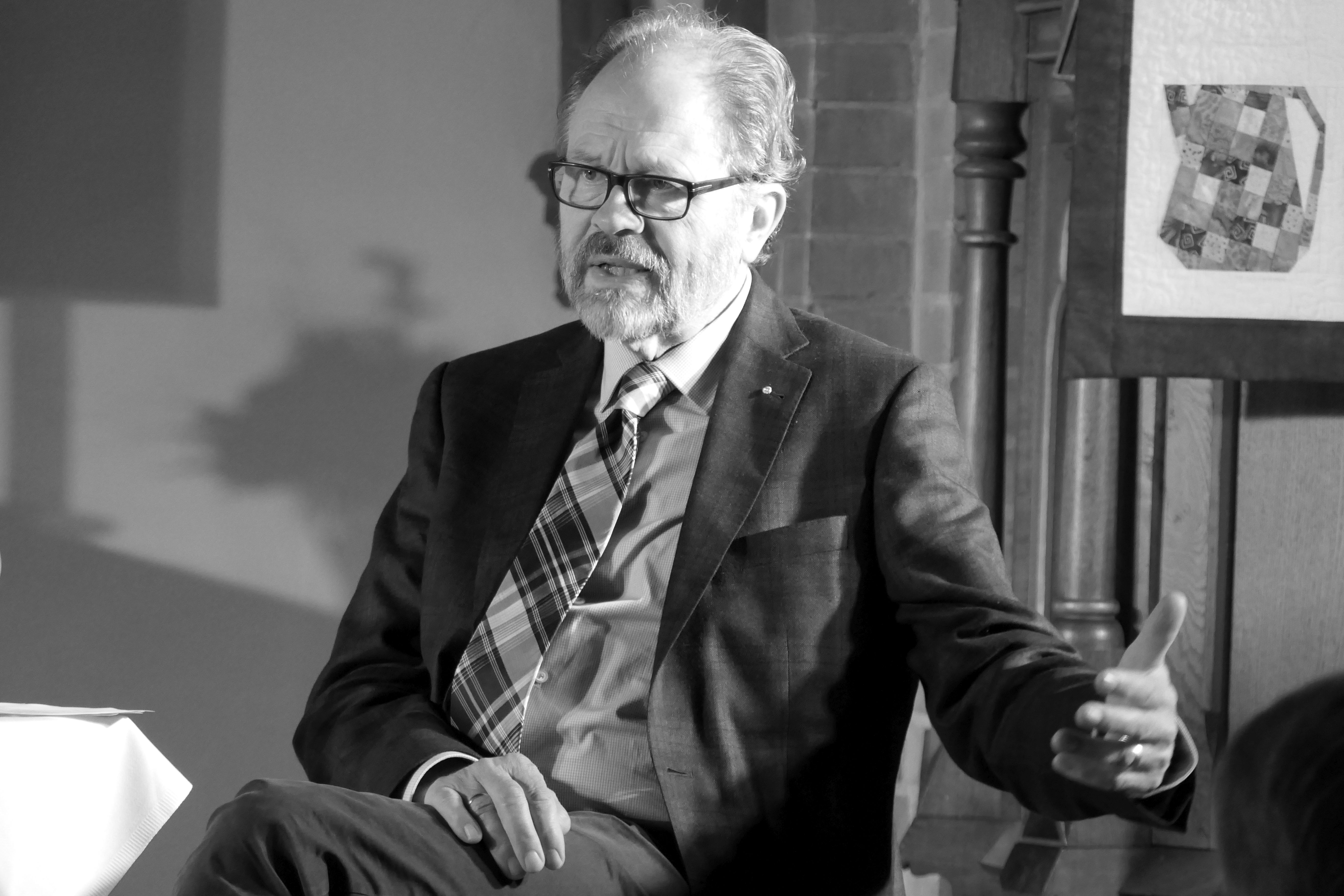 Aufnahme 2019